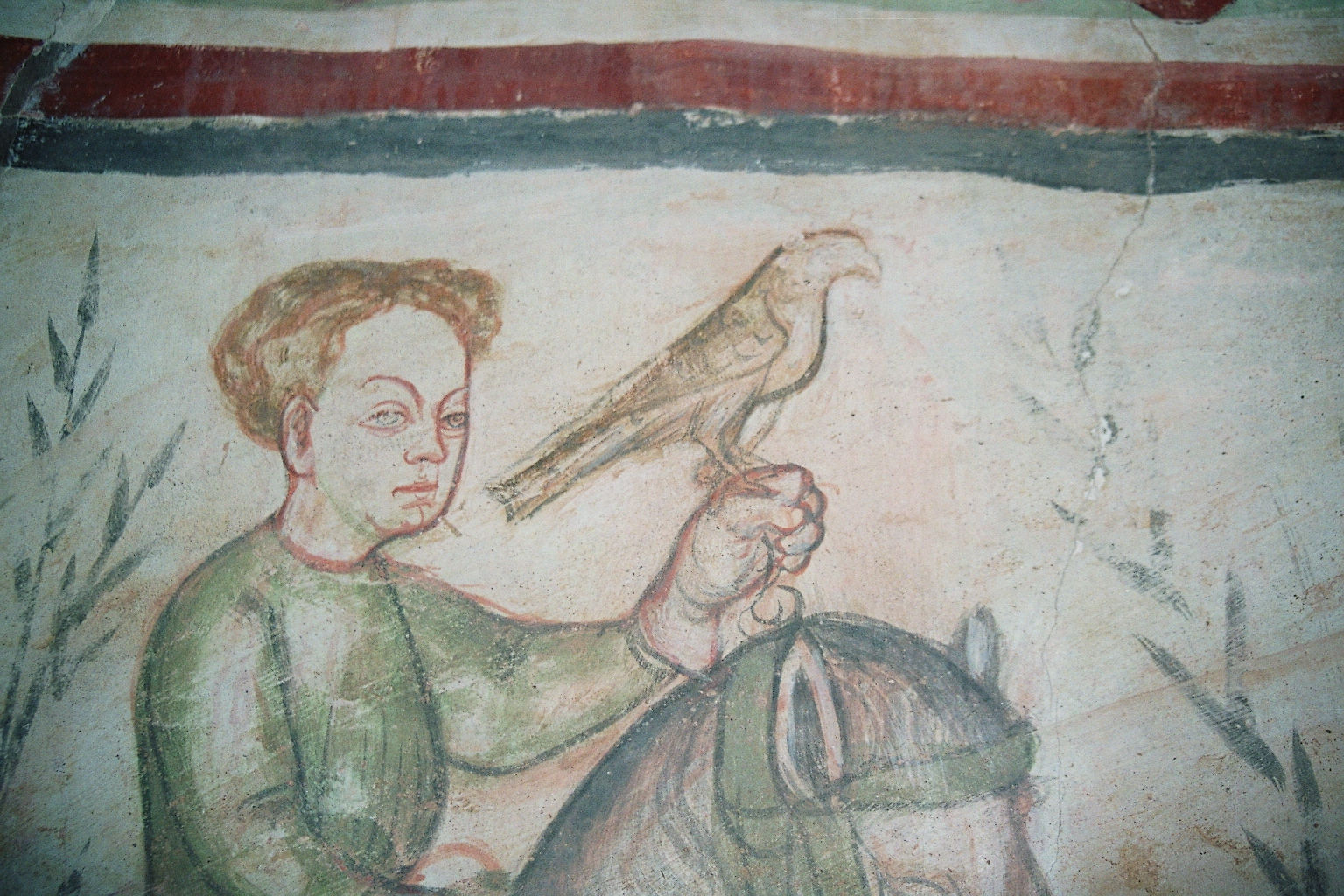 Fara Novarese (NO), Chiesa di San Pietro e San Paolo: interno, abside, particolare del ciclo dei mesi. Cavaliere con falco